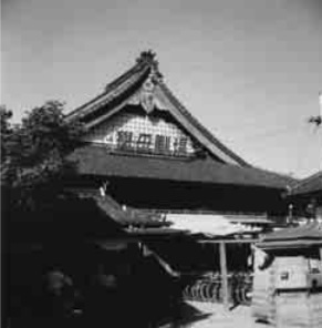 愛知県豊田市にあった映画館「挙母劇場」。1994年頃閉館。